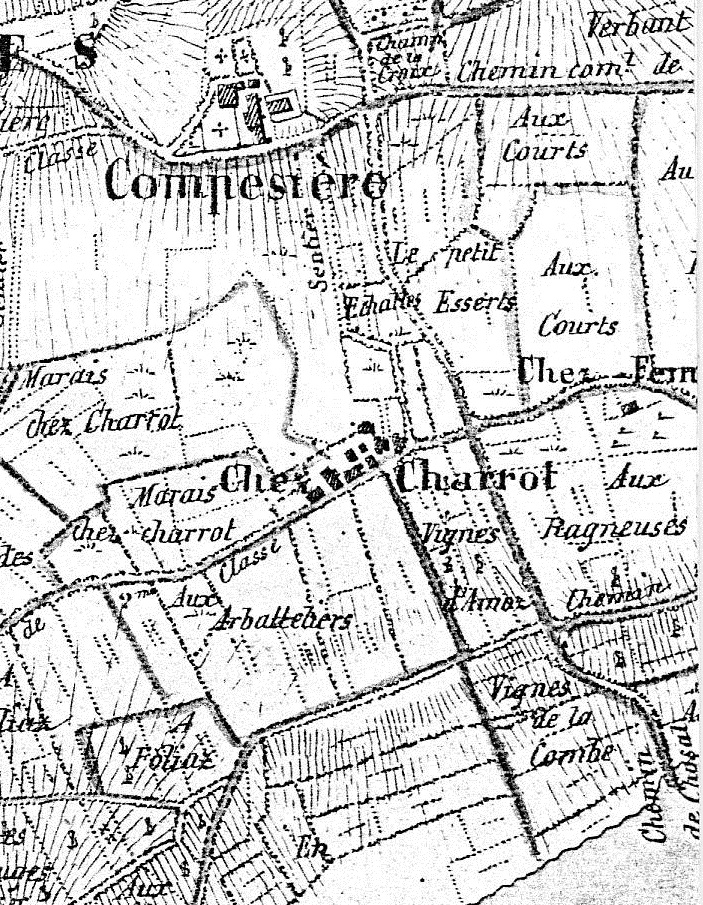 Ancienne commune de Compesières dans le canton de Genève, détail de la carte « Mayer » de 1830. Détail centré sur Charrot.